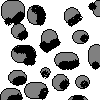 soil structure: Elementargefuege